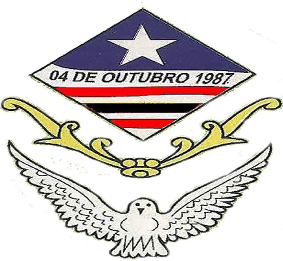 Zé Doca